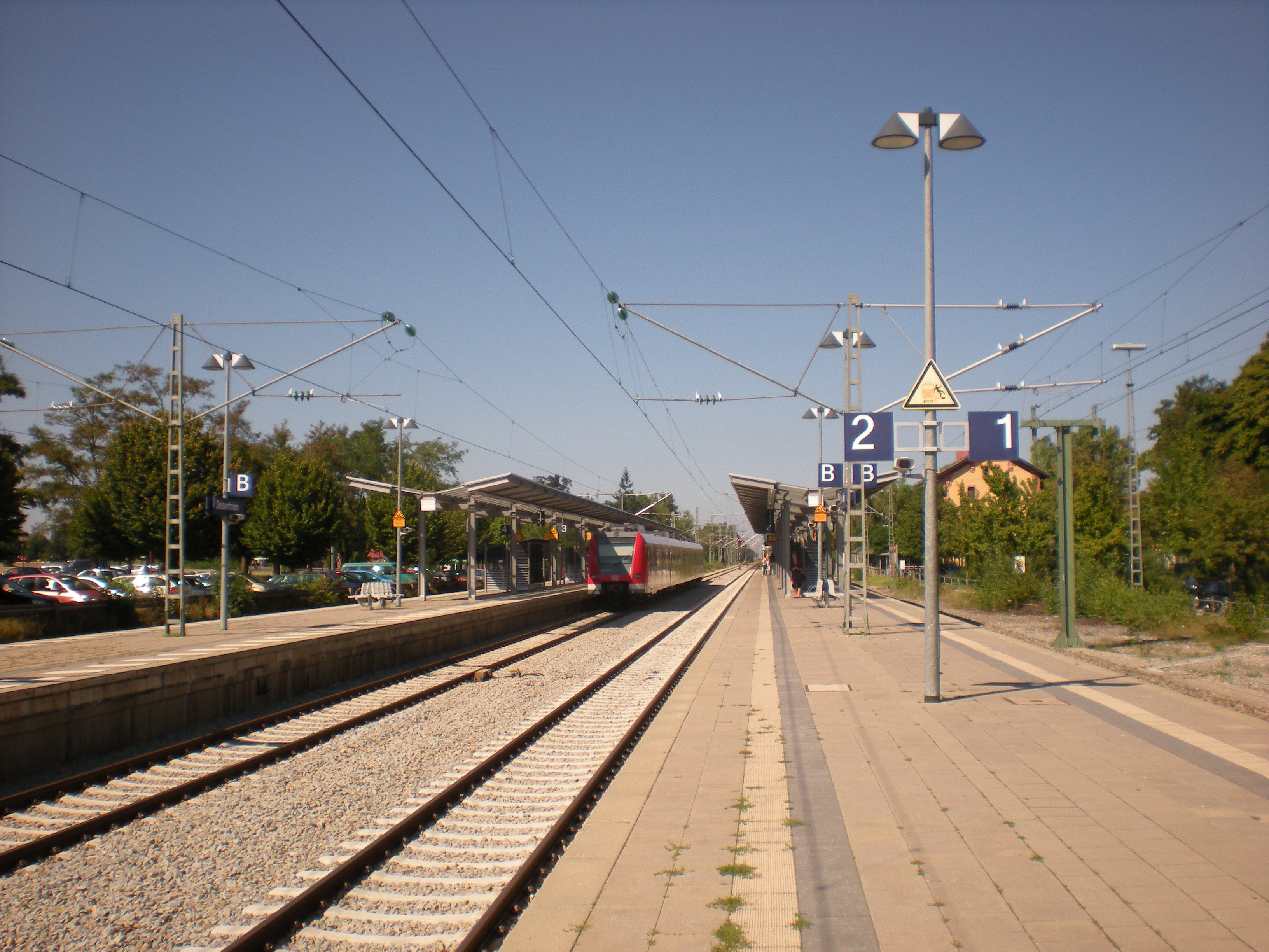 Mittelbahnsteige des S-Bahnhofs Deisenhofen mit S20 nach Pasing